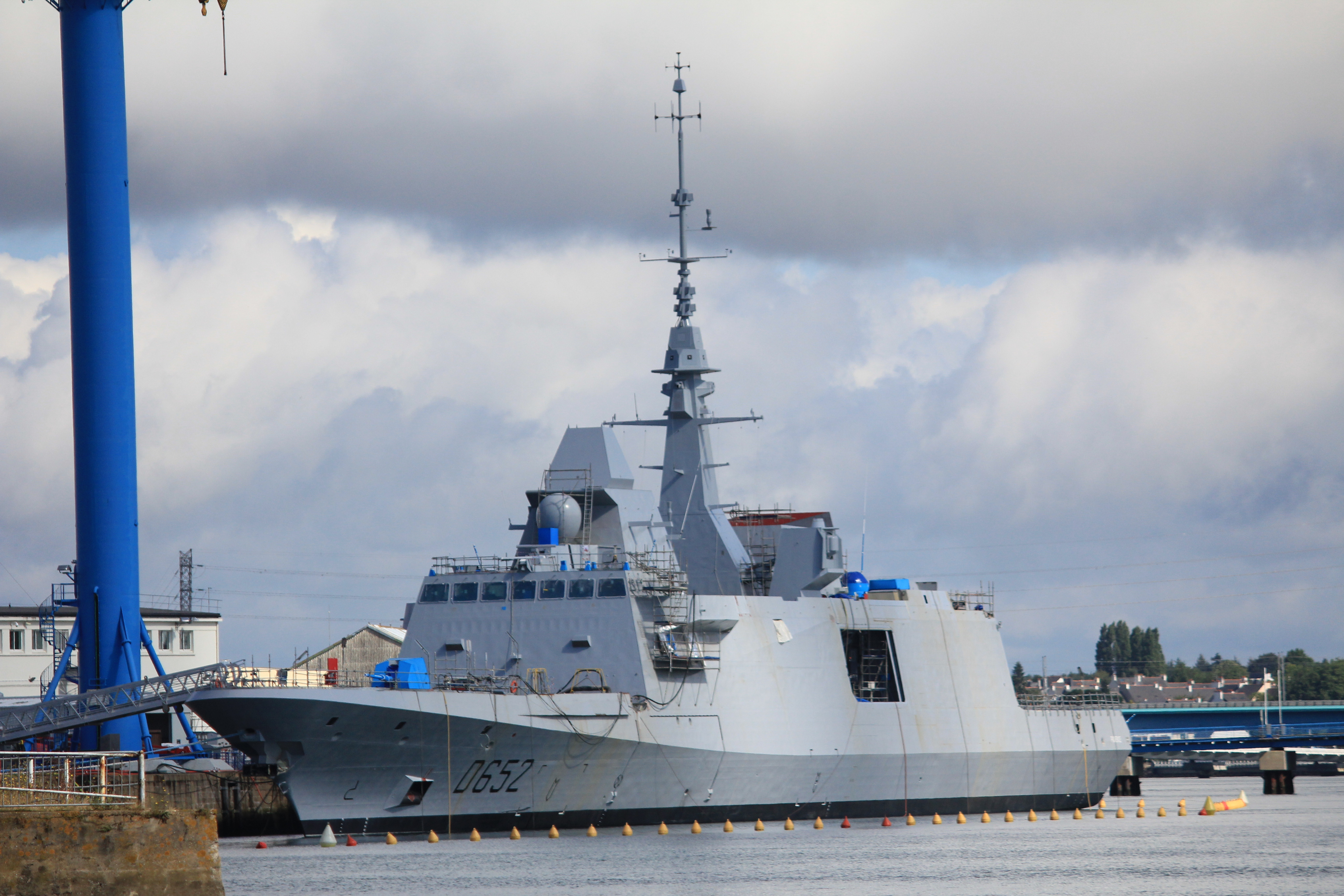 La FREMM Provence à Lorient en août 2014.